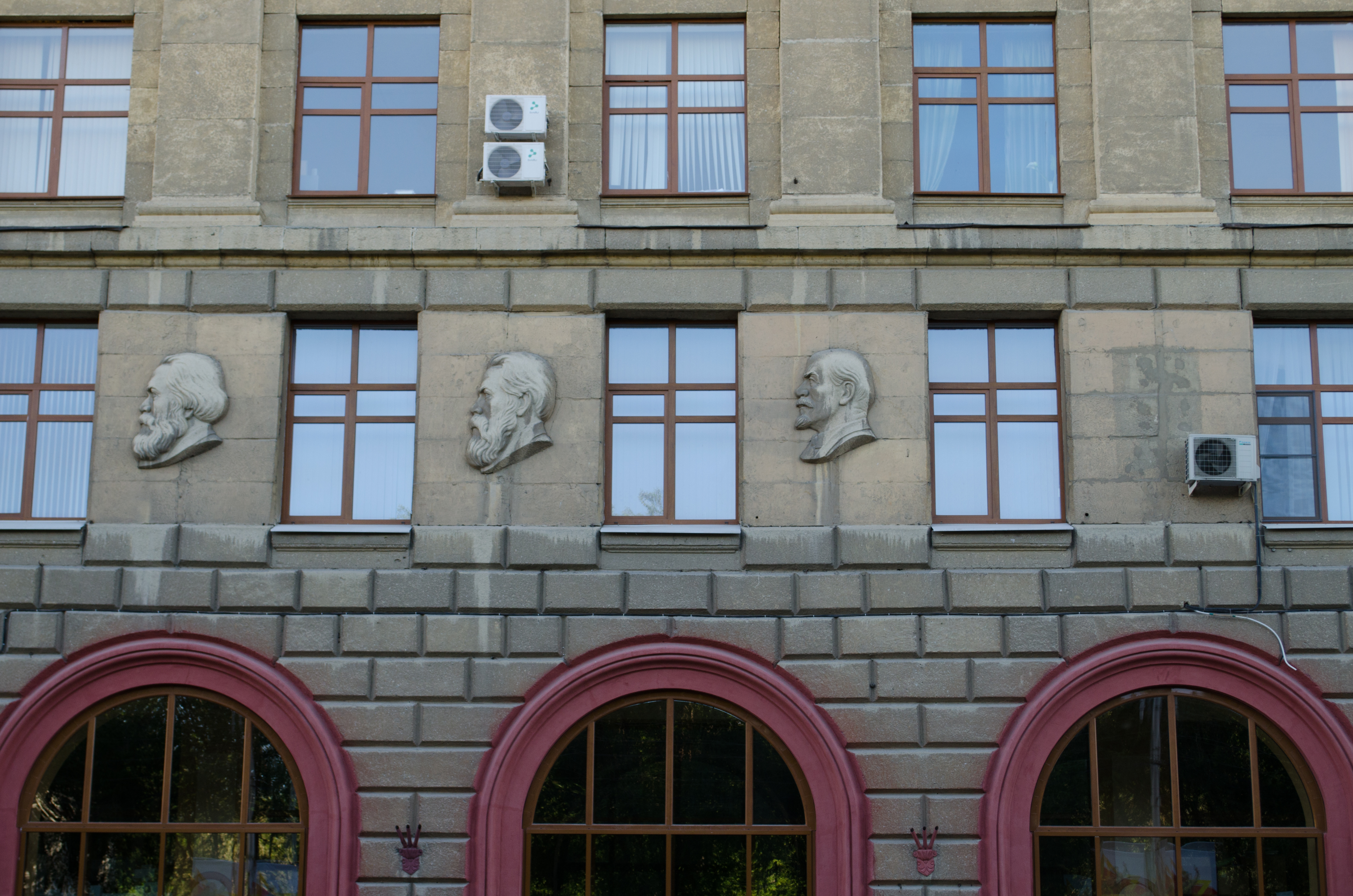 Барельефы над главным входом в медицинский университет Волгограда. Изображали профили Маркса, Энгельса, Ленина и Сталина, однако, в ходе борьбы с культом личности Сталина, последний барельеф был сбит.